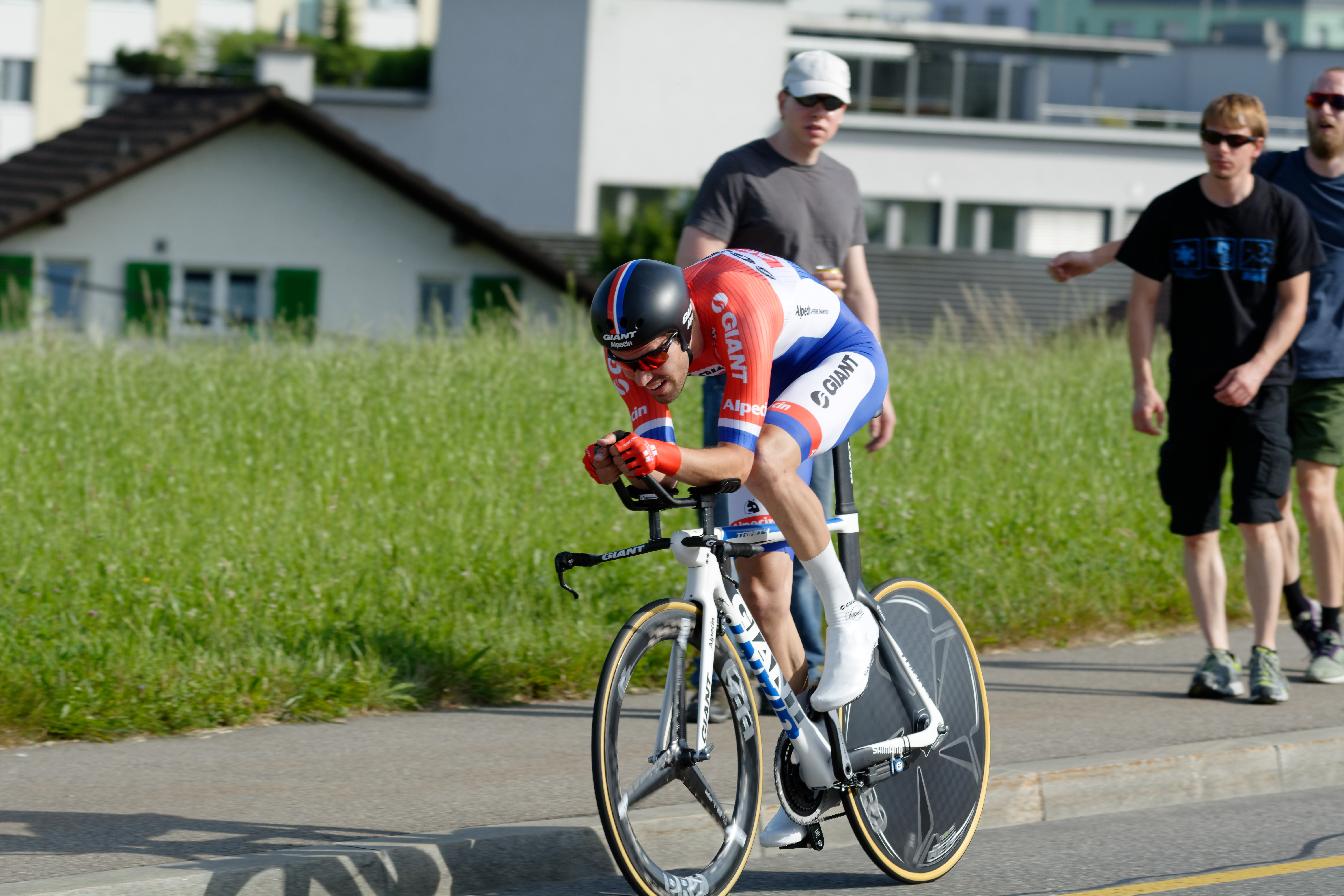 D71_9635_DxO